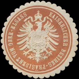 Sealing stamp Title: K. Bezirks-Präsident von Ober-Elsass Description: braun, weiß, geprägt Place: Colmar/Elsaß size: 4 cm